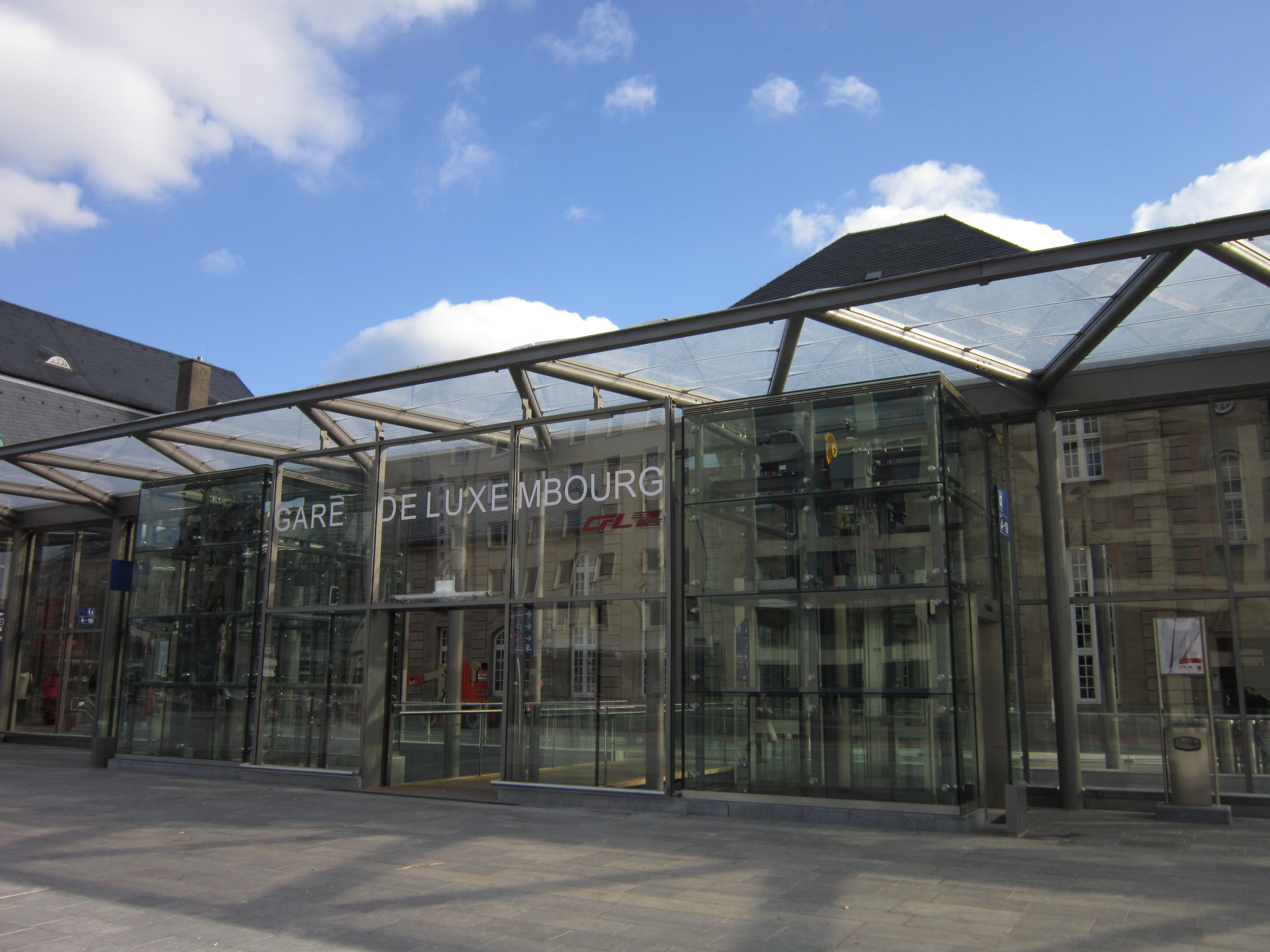 Nouvelle véranda de la gare de Luxembourg Ville en octobre 2012.